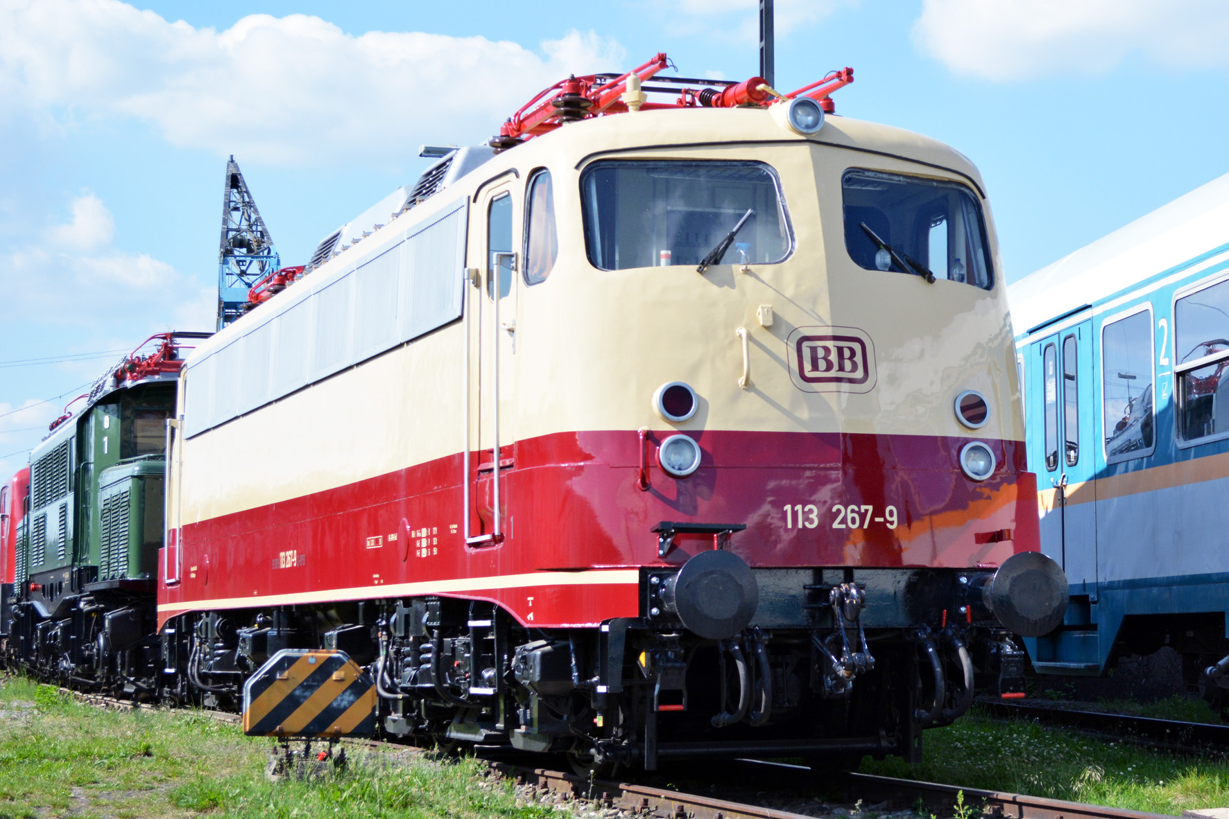 DB-Baureihe E 10/113 Lok 113 267-9 am 02.11.2019 in Nördlingen